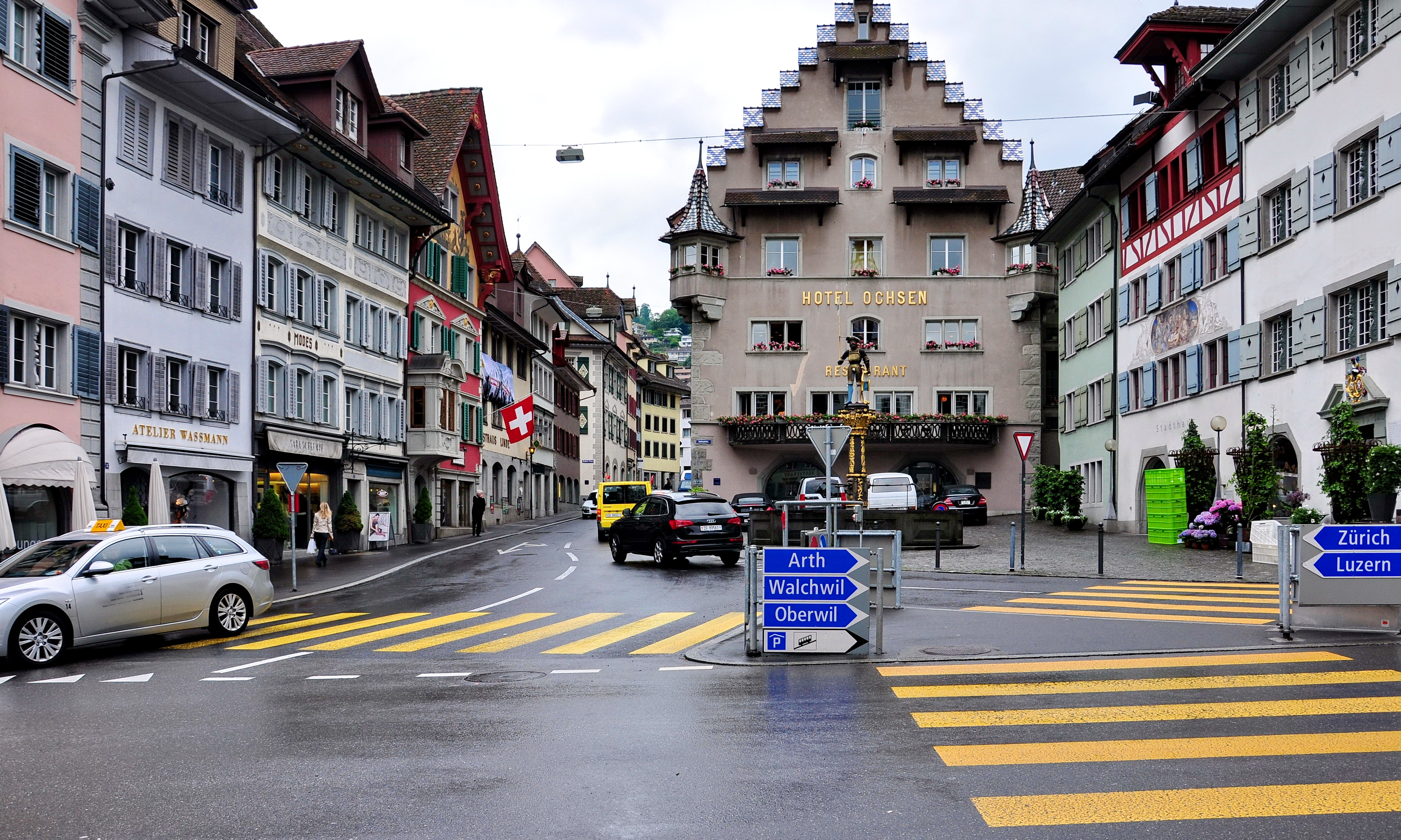 Kolingplatz in Zug (Switzerland)